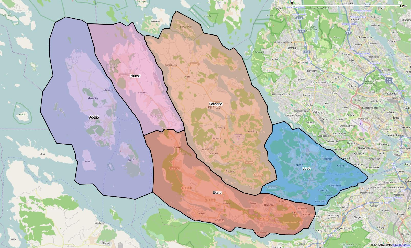 Distriktsindelningen i Ekerö kommun